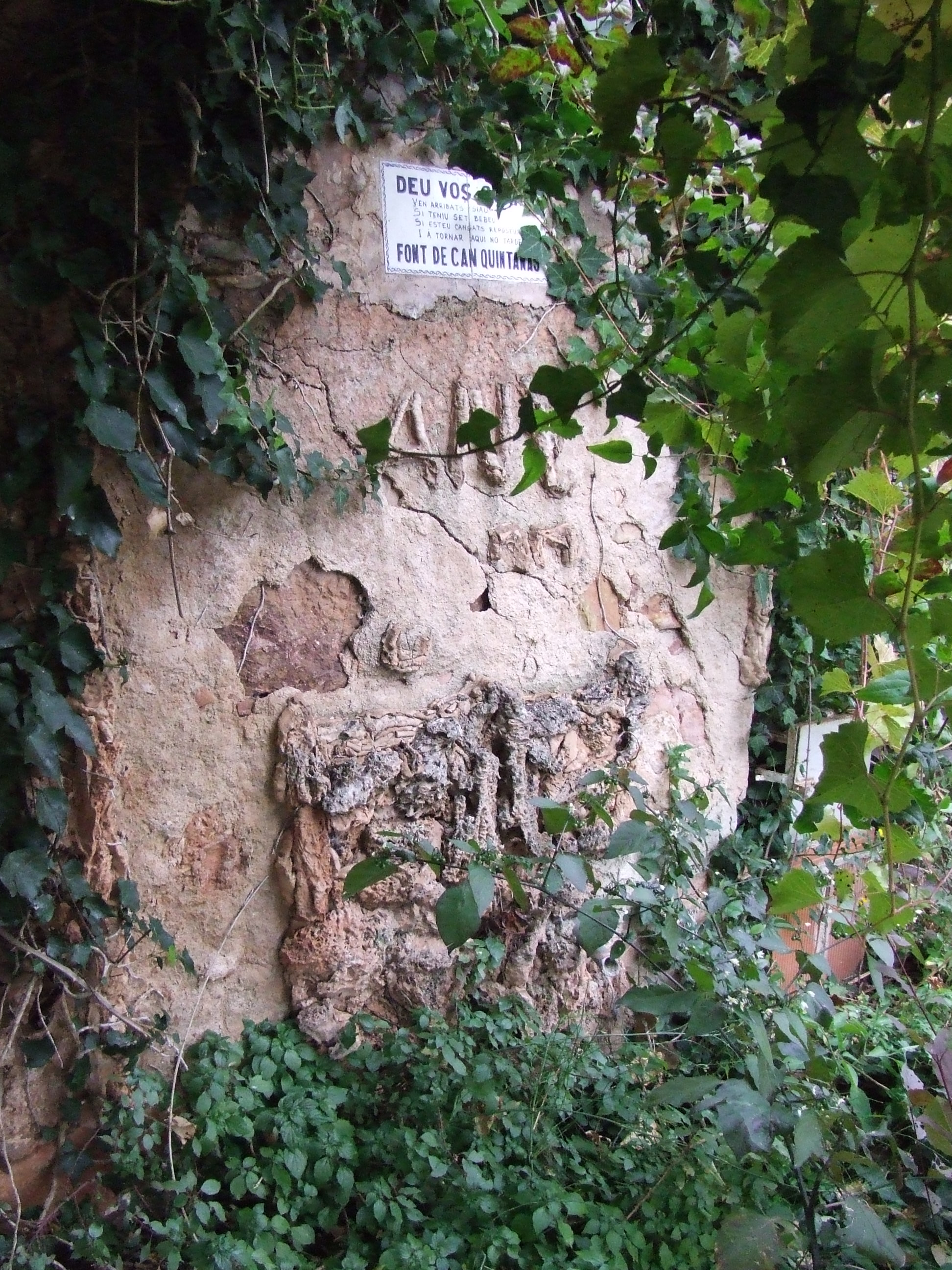 Font de Can Quintanes (Riells del Fai, Bigues i Riells, Vallès Oriental)